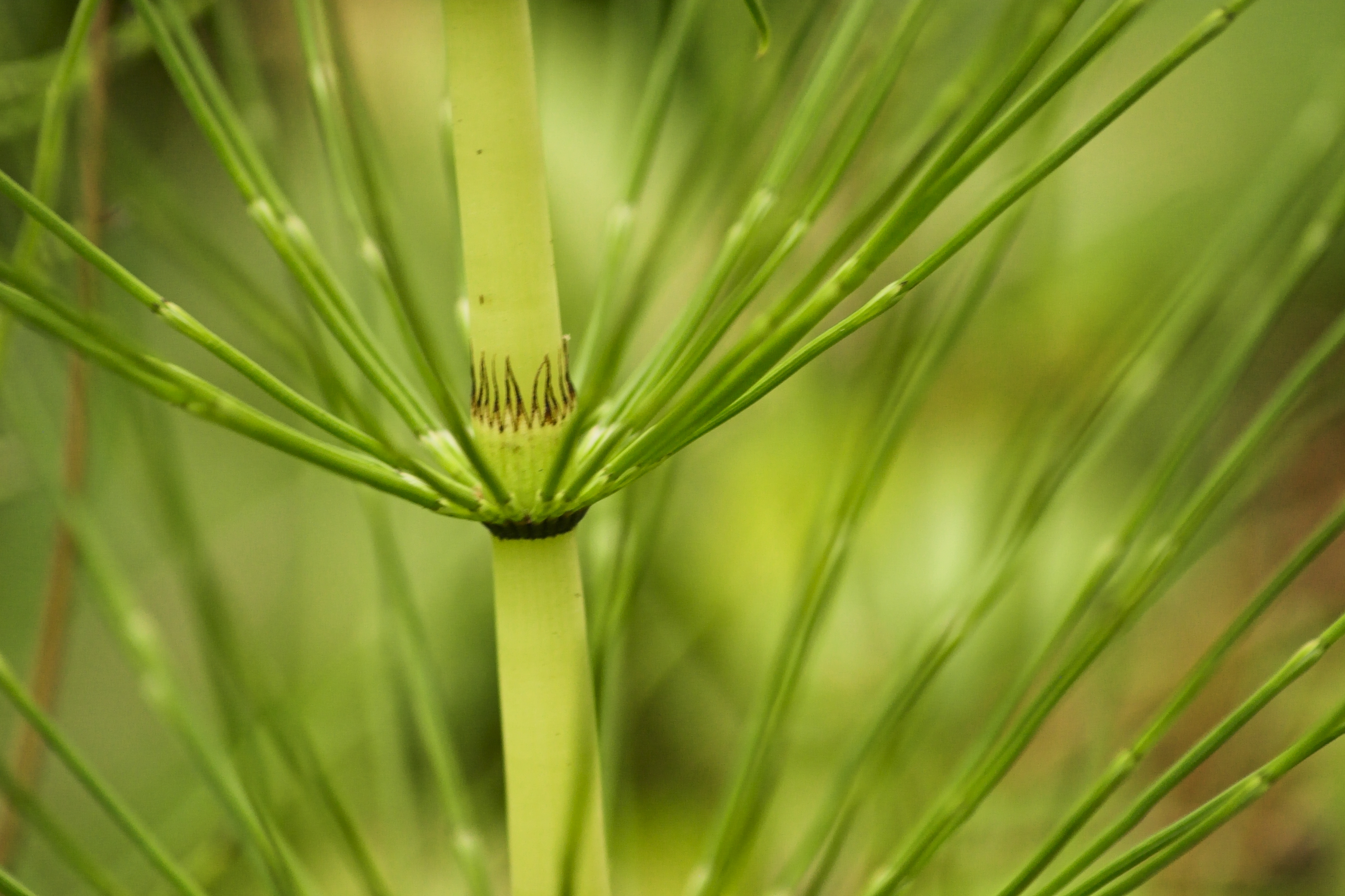 Equisetum telmateia detail from Maramureş Mountains.